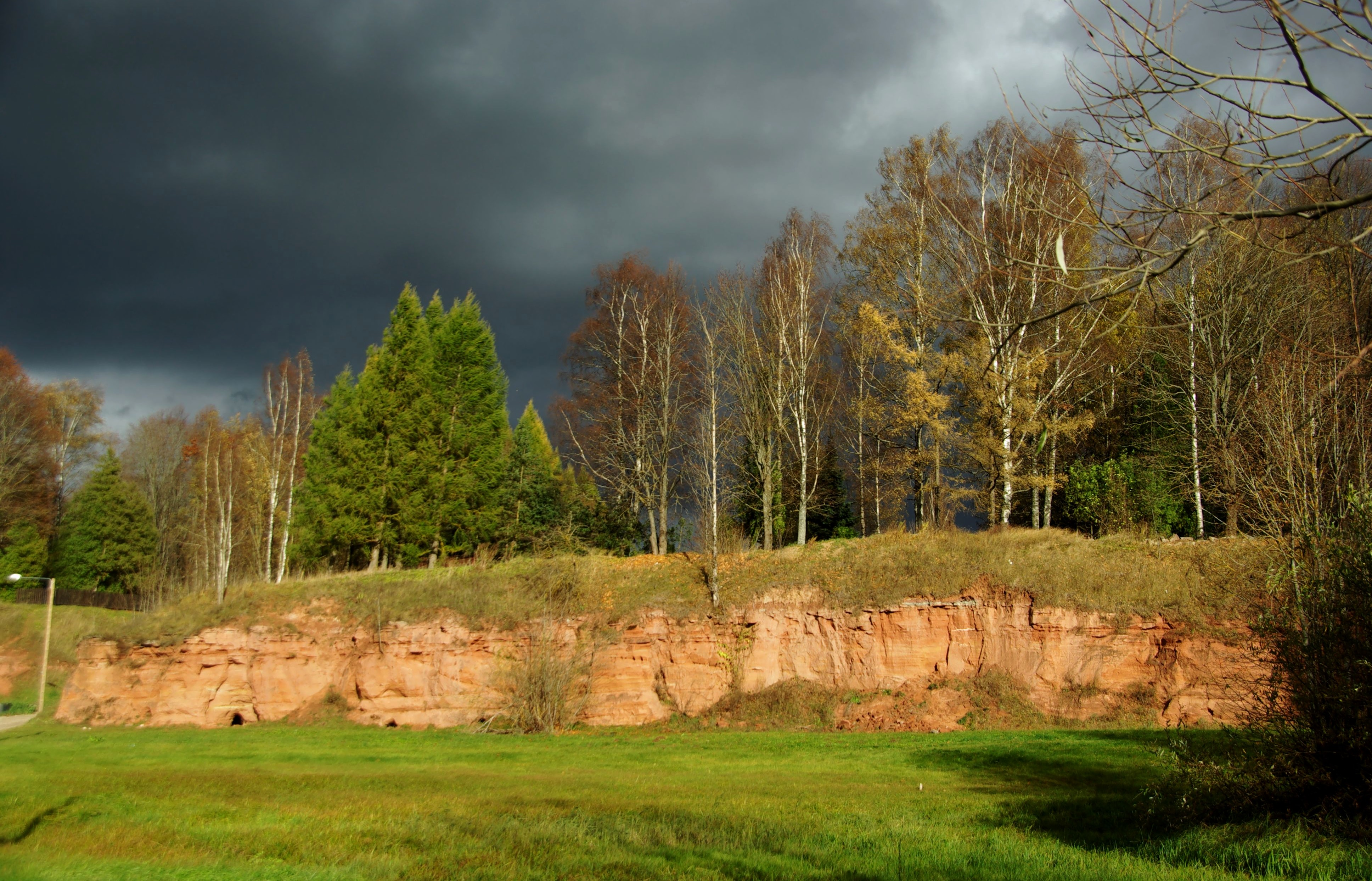 asub Tartu linnas Emajõe ürgoru vasakul kaldal